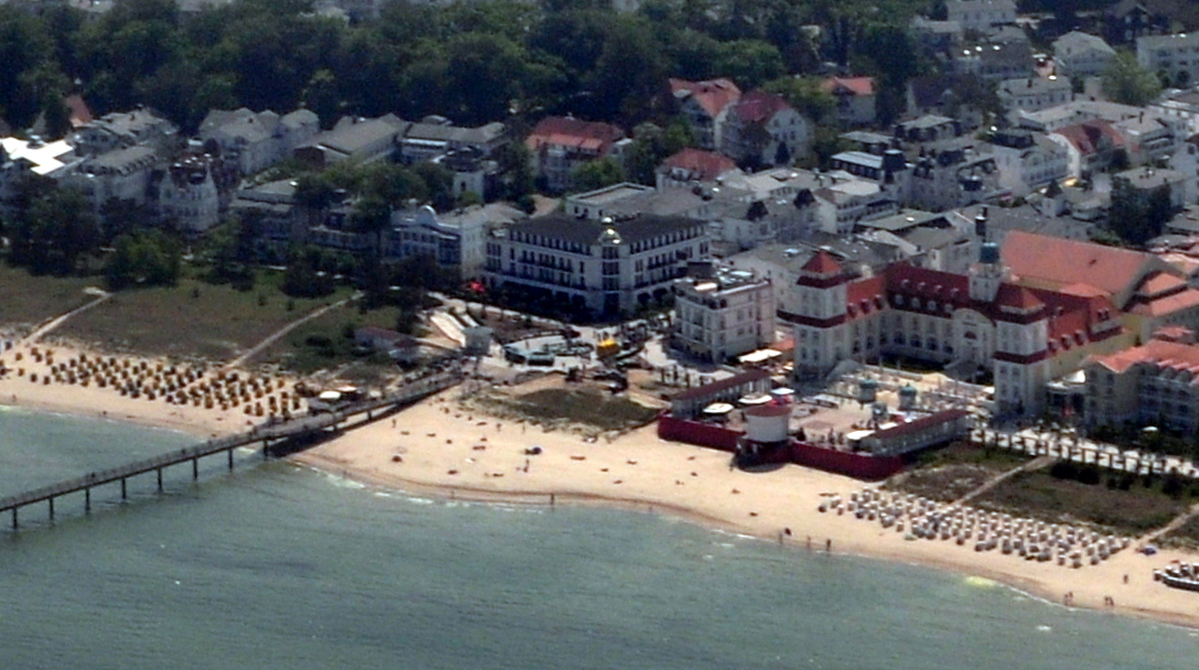 Die Bilder wurden von mir während eines einstündigen Rundflugs ab Flugplatz Güttin am 21. Mai 2011 aufgenommen. Die Bildbeschreibung steht im Dateinamen. Aufgenommen mit einer Nikon D5000 durch das Seitenfenster des Flugzeugs.